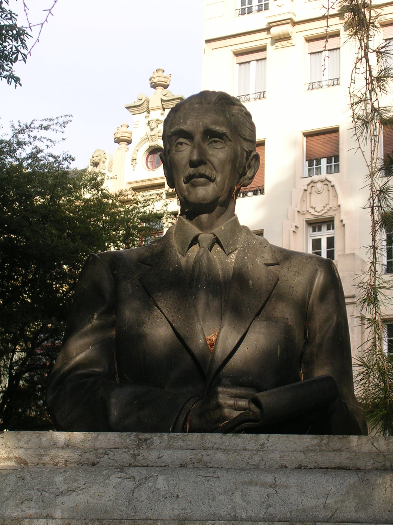 Busto dedicado a Alfonso Iglesias en el Parque San Francisco de Oviedo, Asturias.